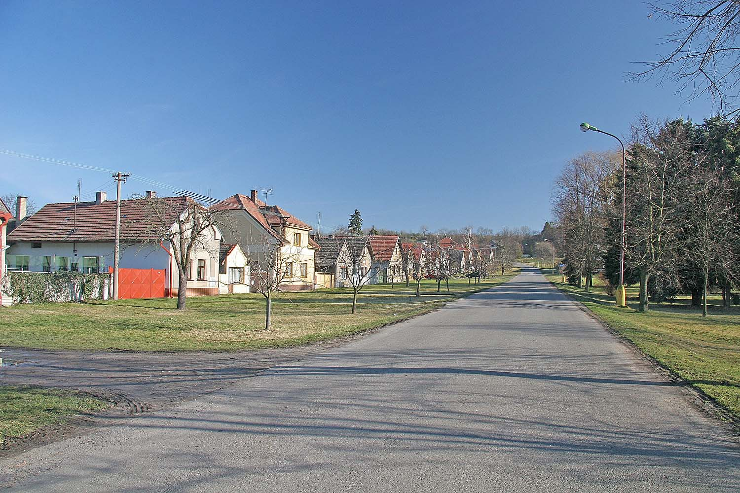 Náves v obci Vrbice, district Nymburk autor:Prazak date:17. 2. 2007